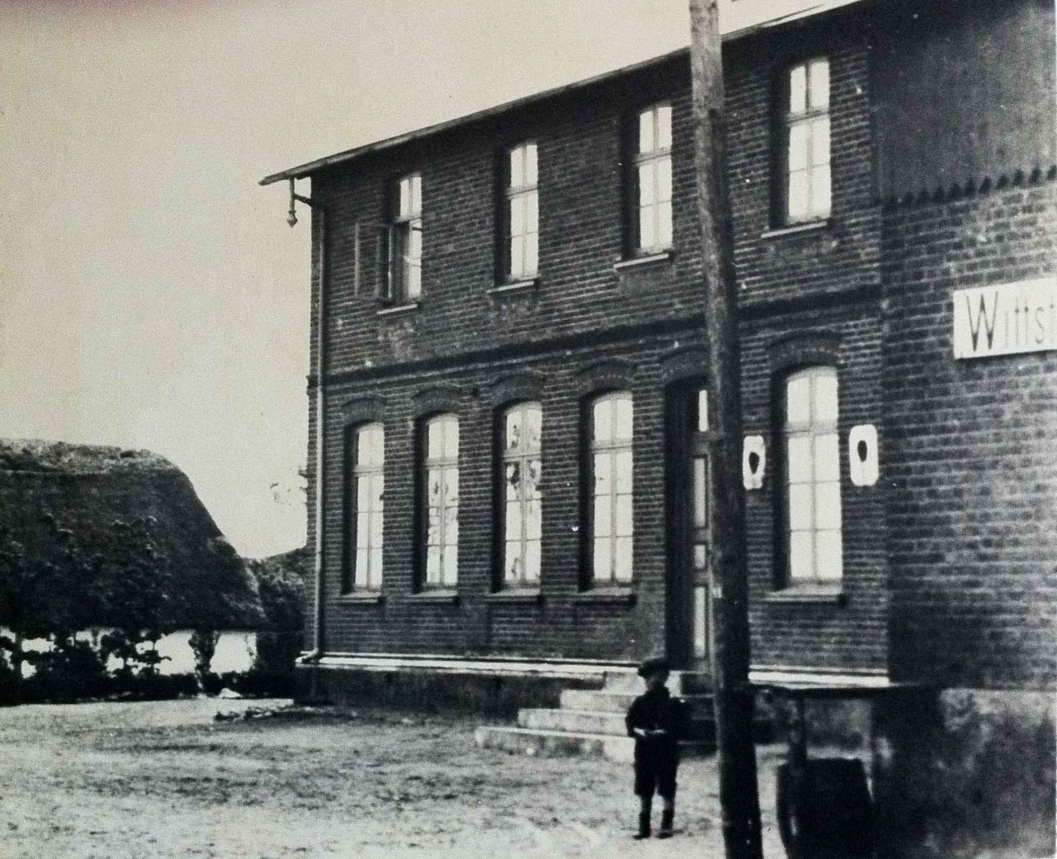 Gammelt billede af Slukefter Kro, da den i den tyske tid var Wittstedt stationskro på Haderslev Amts Jernbaner